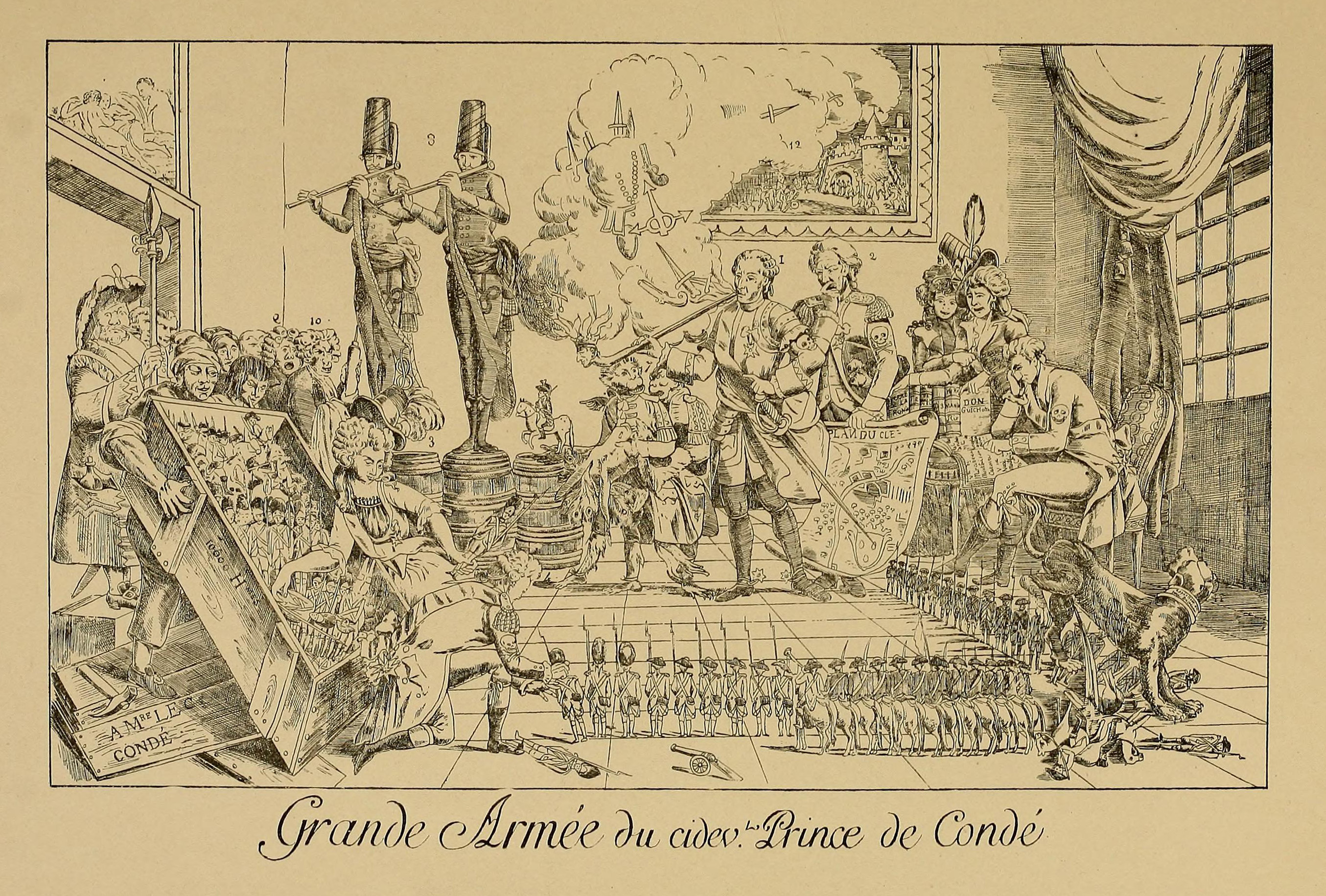 Illustration from Histoire des jouets